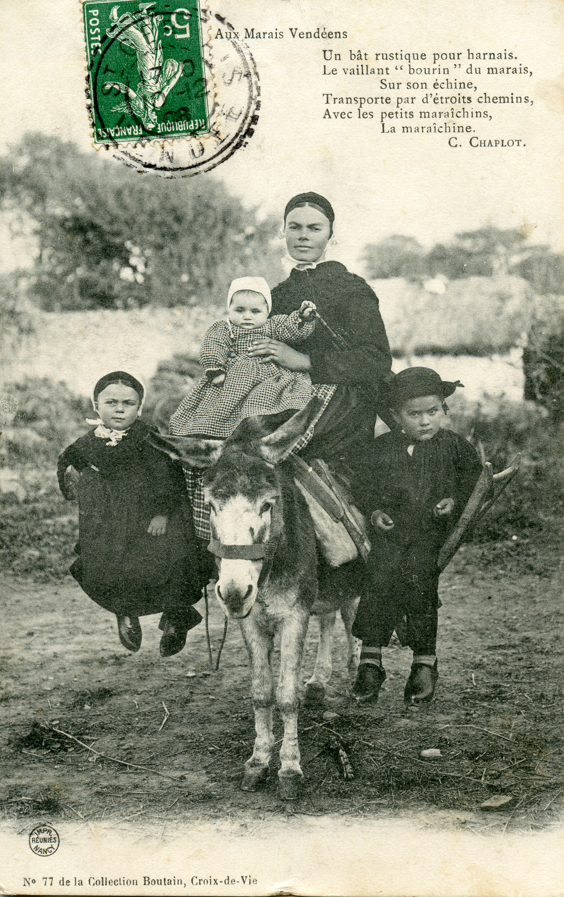 Carte postale d'une maraîchine et des ses enfants sur un mulet, Marais vendéen, France. Collection Boutain, no 77. Postée en 1908. Phototypie.